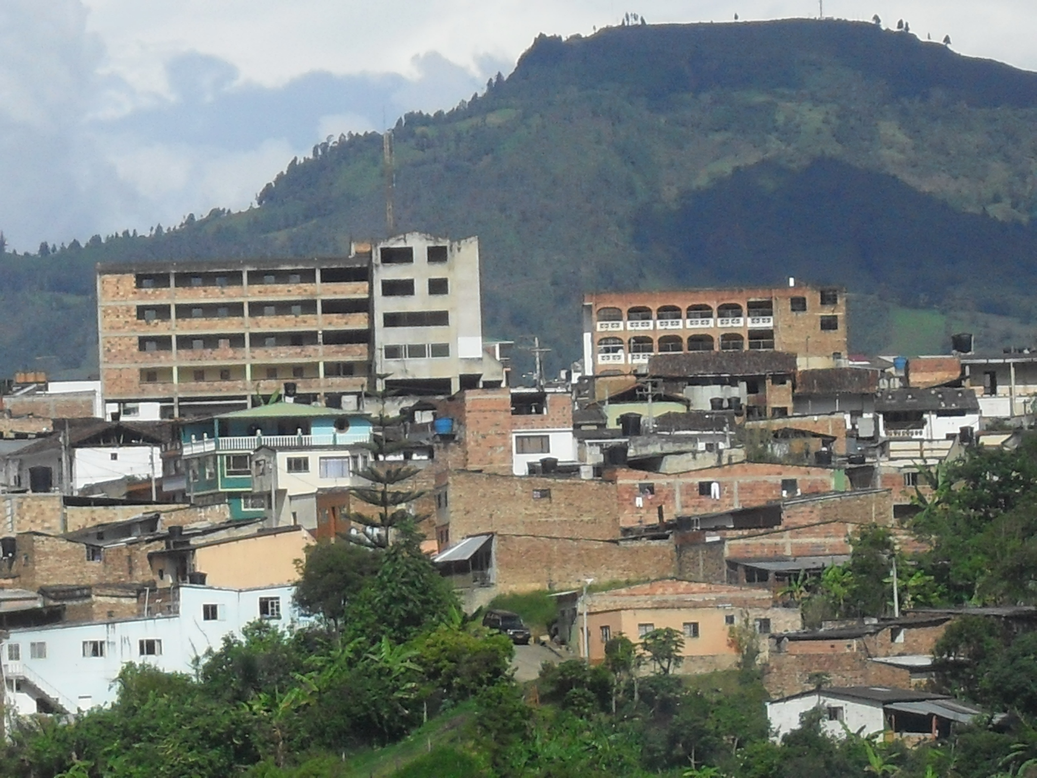 Centro urbano del municipio de Guateque-Boyaca